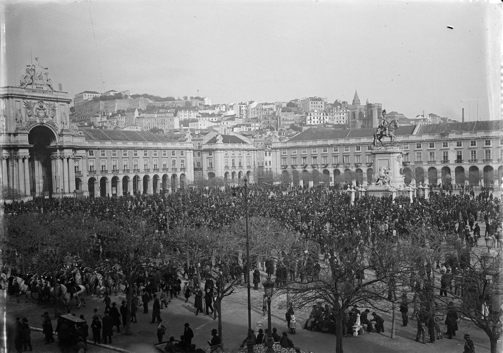 Título: A praça do Comércio durante a organização do cortejo que foi saudar o Chefe de Estado e as legações estrangeiras pela vitória dos aliados na Primeira Guerra Mundial Dimensão: 9 x 12 cm Nota de publicação : MATOS, José Sarmento, org. - Lisboa à beira Tejo : 1860-2010 . Lisboa, EGEAC, 2010. ISBN 978-989-8167-07-1. Cota FOT COL MAT Ana Homem de Melo...[et al.] - Lisboa republicana.Lisboa : CM, 2010. ISBN 978-972-9231 Invalid ISBN-04-09. p. 27 MATOS, José Sarmento de- Lisboa à beira tejo:1860-2010. Lisboa: Câmara Municipal-EGEAC,EEM. 2010. ISBN 978-989-8167-07-1. p.78 Notas: Inscrição no original: 7713. Artigo na Ilustração Portuguesa, 1918, 18 de Novembro. Assunto: Terreiro do Paço (arcada, Santa Maria Maior, Lisboa, Portugal) / Comemoração / Primeira Guerra Mundial, 1914-1918 / Monumento / Manifestação / Rua Augusta (arco, Santa Maria Maior, Lisboa, Portugal) / José I. 1714-1777, rei de Portugal / Comércio (praça, Santa Maria Maior, Lisboa, Portugal) Código de referência: PT/AMLSB/JBN/001446